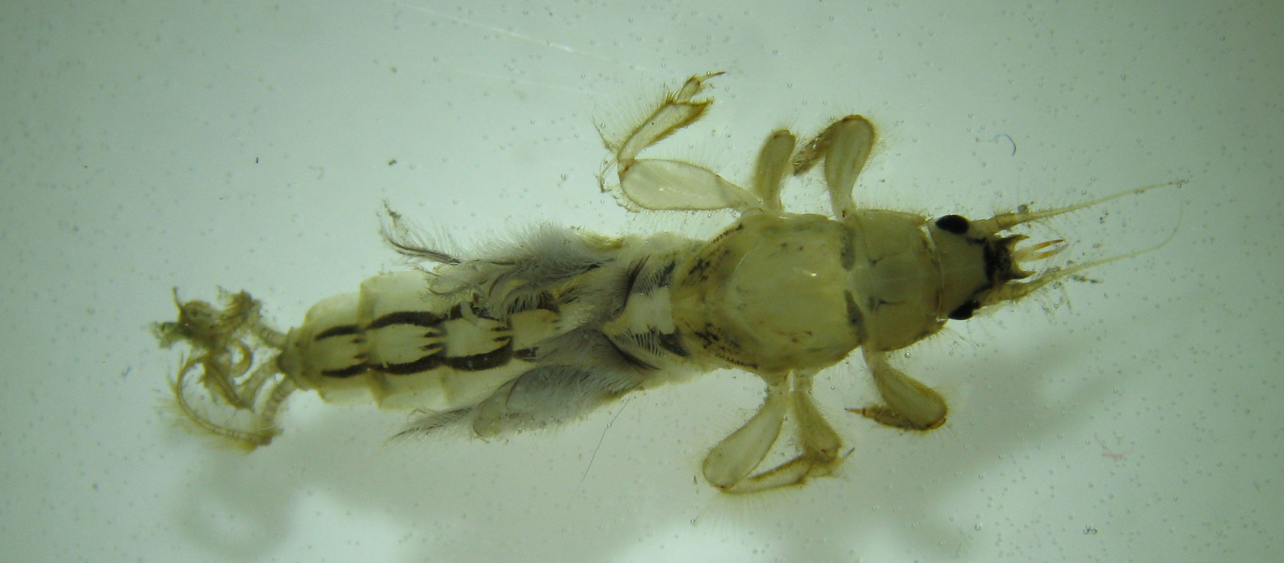 Canal de Savière, Savoie